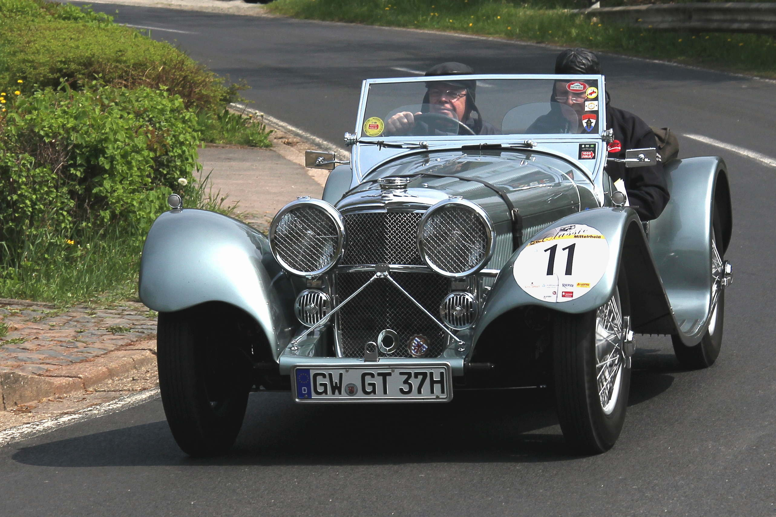 Jaguar S.S. 100, Baujahr 1938, bei der ADAC Mittelrhein Classic 2013; amtliches Kennzeichen verändert